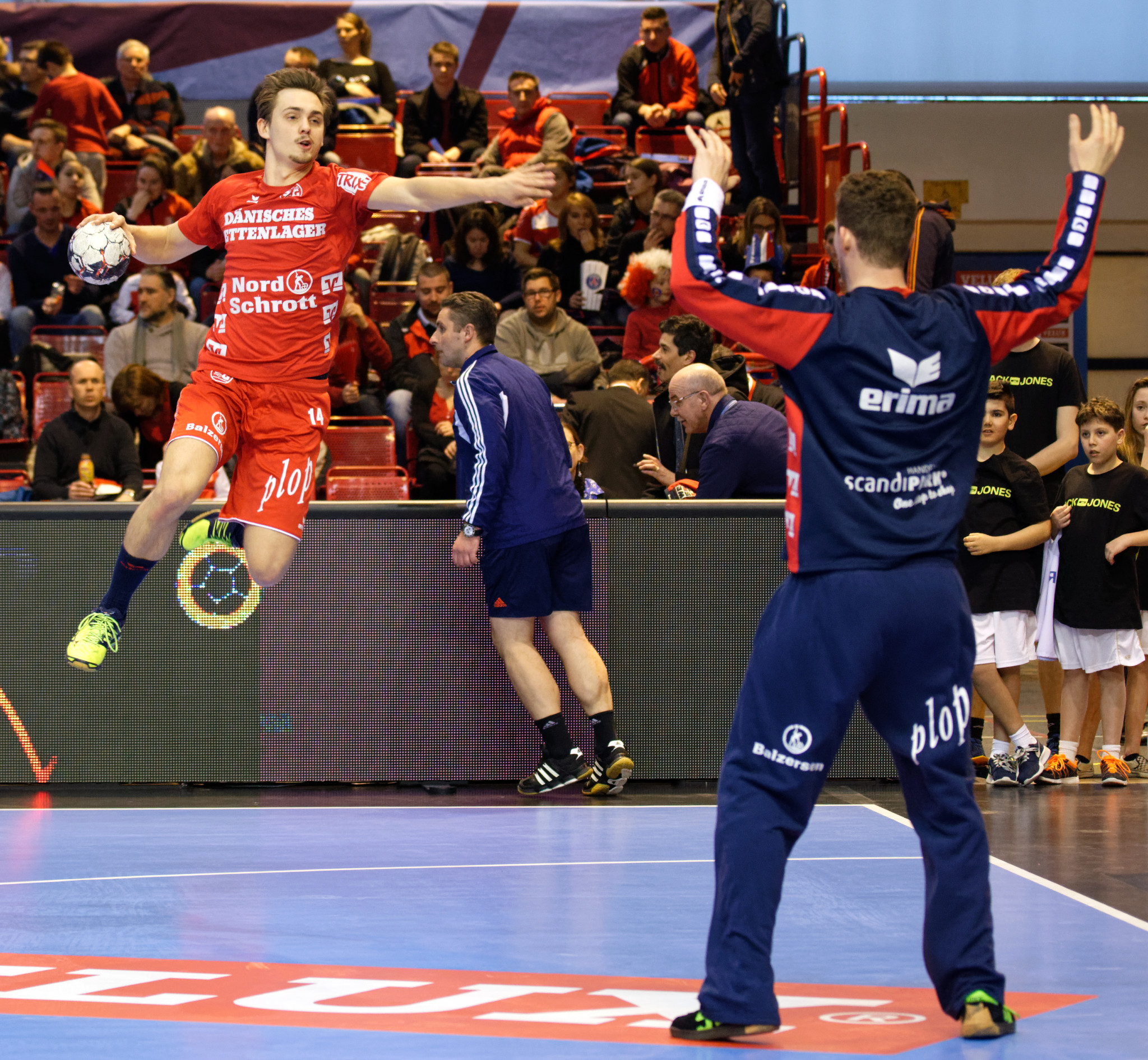 Rencontre de phase de groupe de la Ligue des Champions 2015-16 entre le PSG et SG Flensburg. A la Halle Carpentier (Paris), le 7 mars 2016.